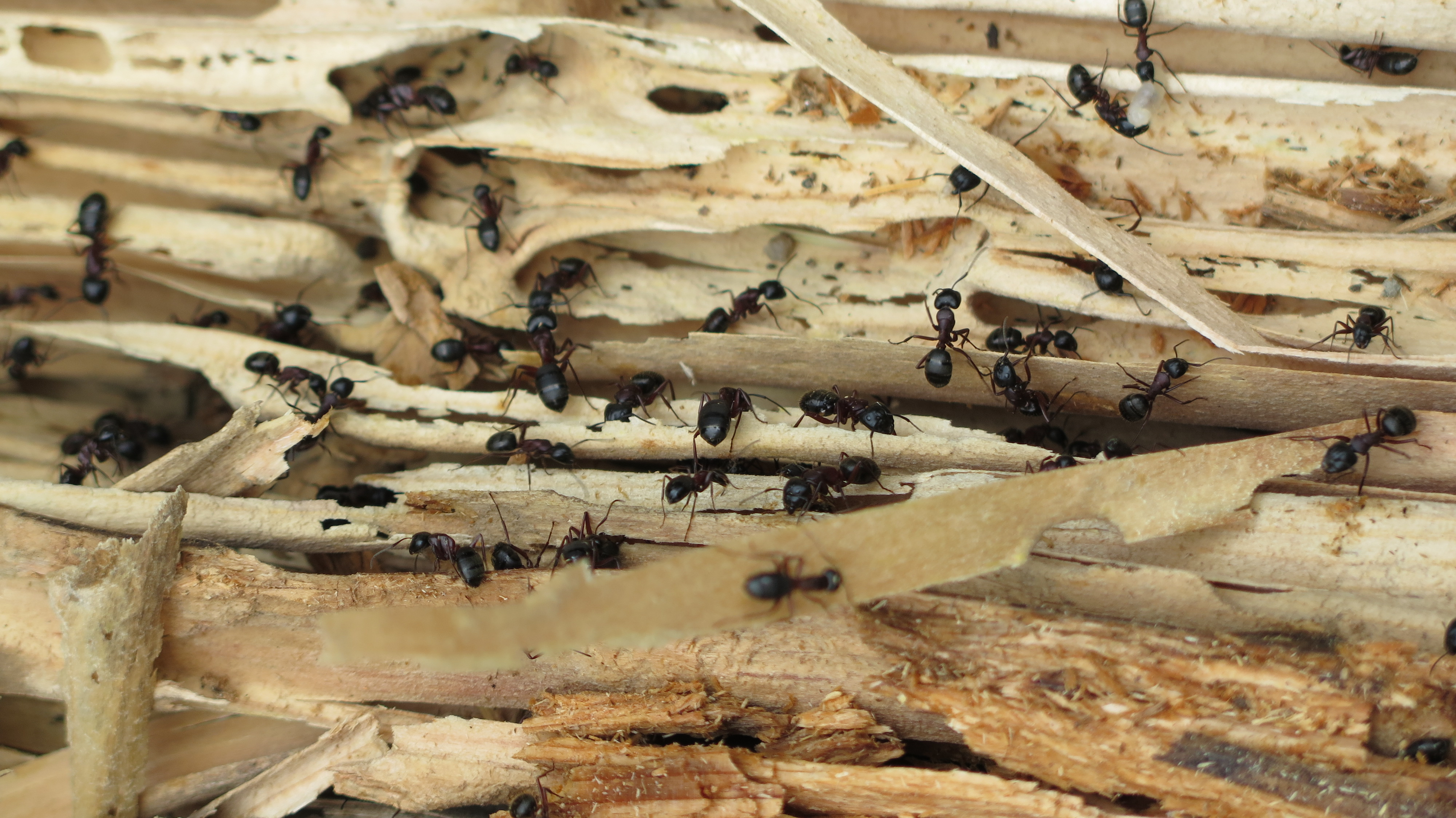 Stokkmaurreir i tømmerstokk.